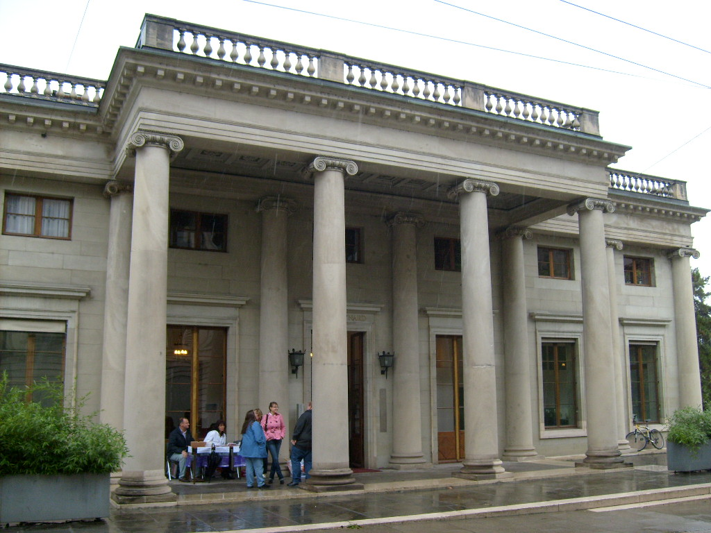 Façade du Palais Eynard sur la rue de la Croix-Rouge à Genève (Suisse)